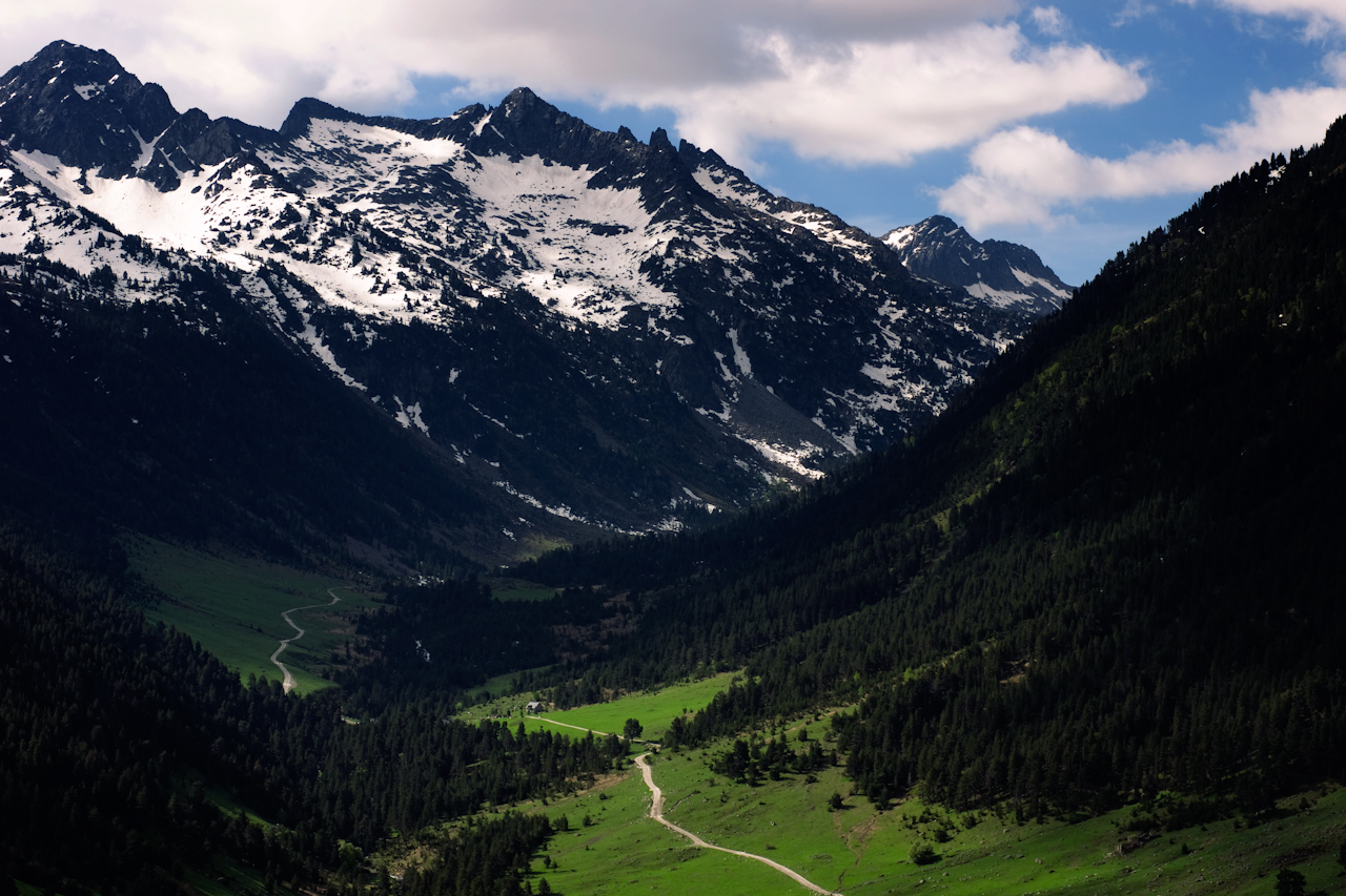 Vall de Ruda, o Val de Ruda, en la Val d'Aran. Foto captada des de l'inici del port de la Bonaigua.